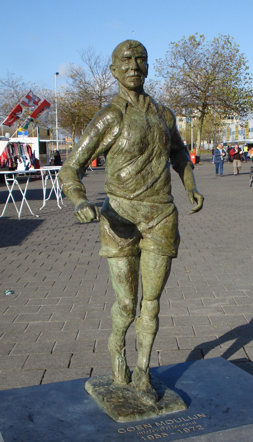 Rotterdam, Feijenoordstadion. Kunstwerk "Coen Moulijn" van Tom Waakop Reijers. Rotterdam/The Netherlands.